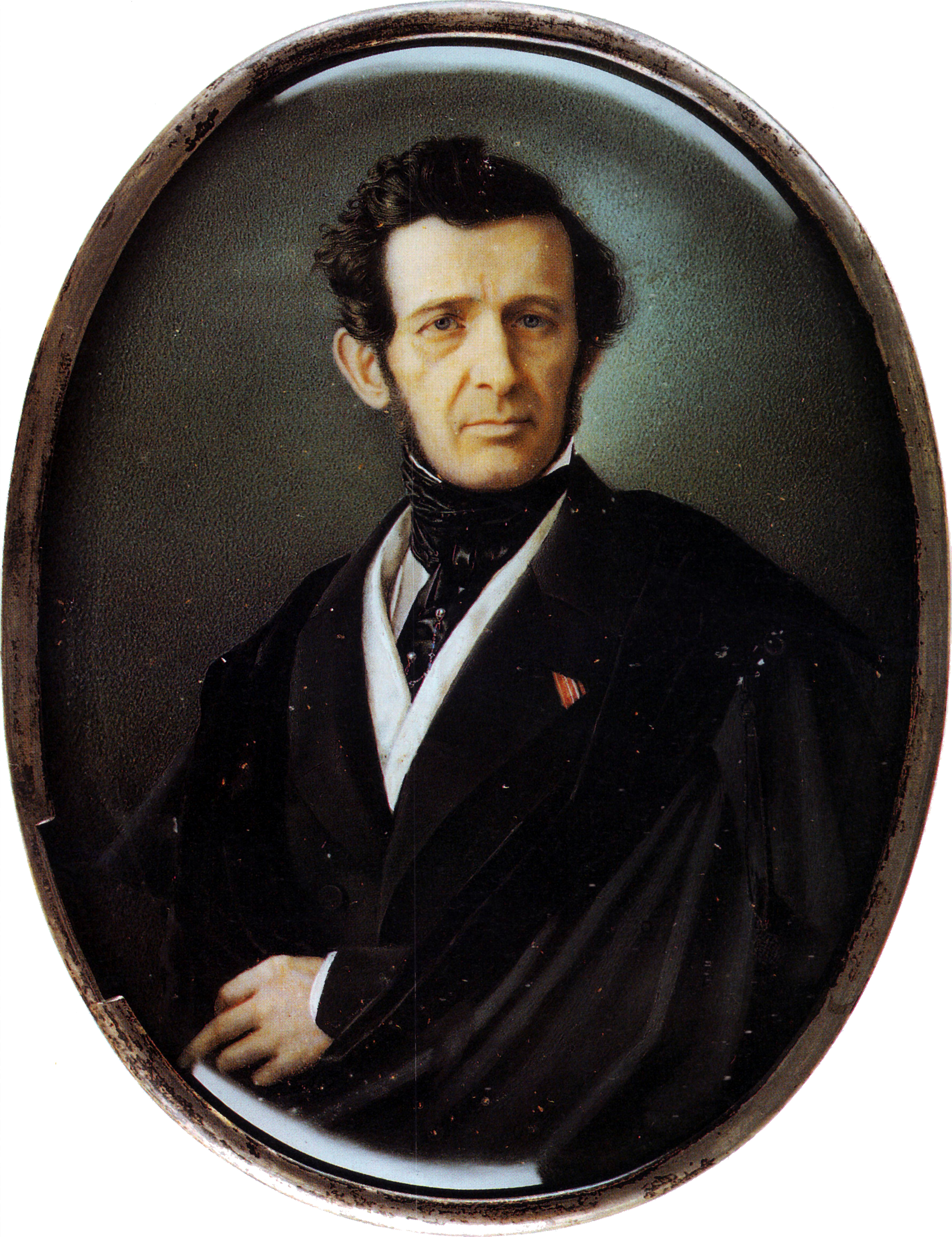 Andrei Shtakenschneider А.И. Штакеншнейдер